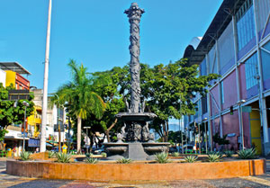 O Chafariz da Praça das Nações em 2012, após ser revitalizado pela Prefeitura da Cidade do Rio de Janeiro.